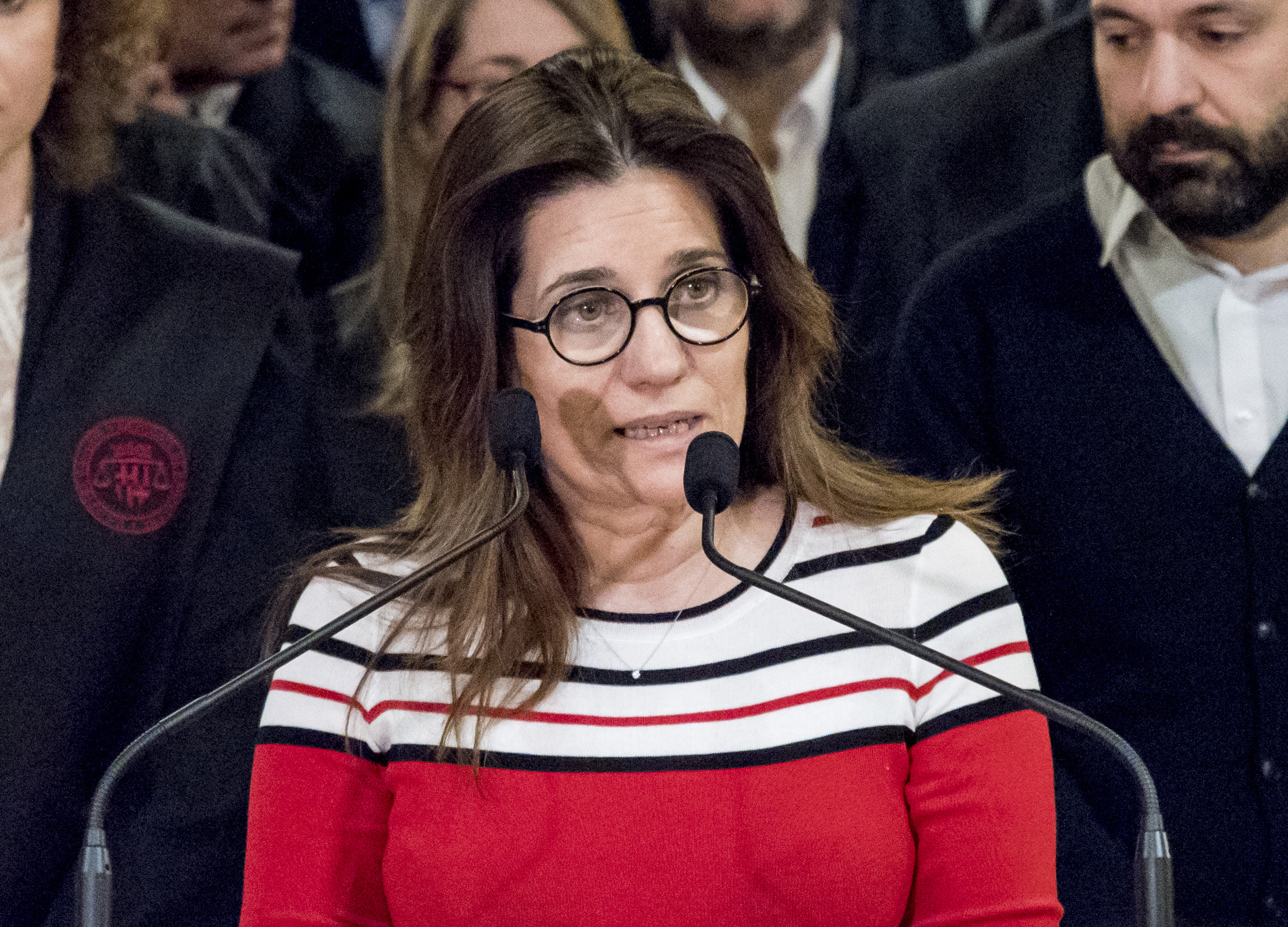 Òmnium ha presentat el seu escrit d'acusació en un acte al Pati de Columnes del Col·legi d'Advocats amb el suport de tot l'equip de defensa del president de l'entitat i més de mig centenar de professionals del món del dret